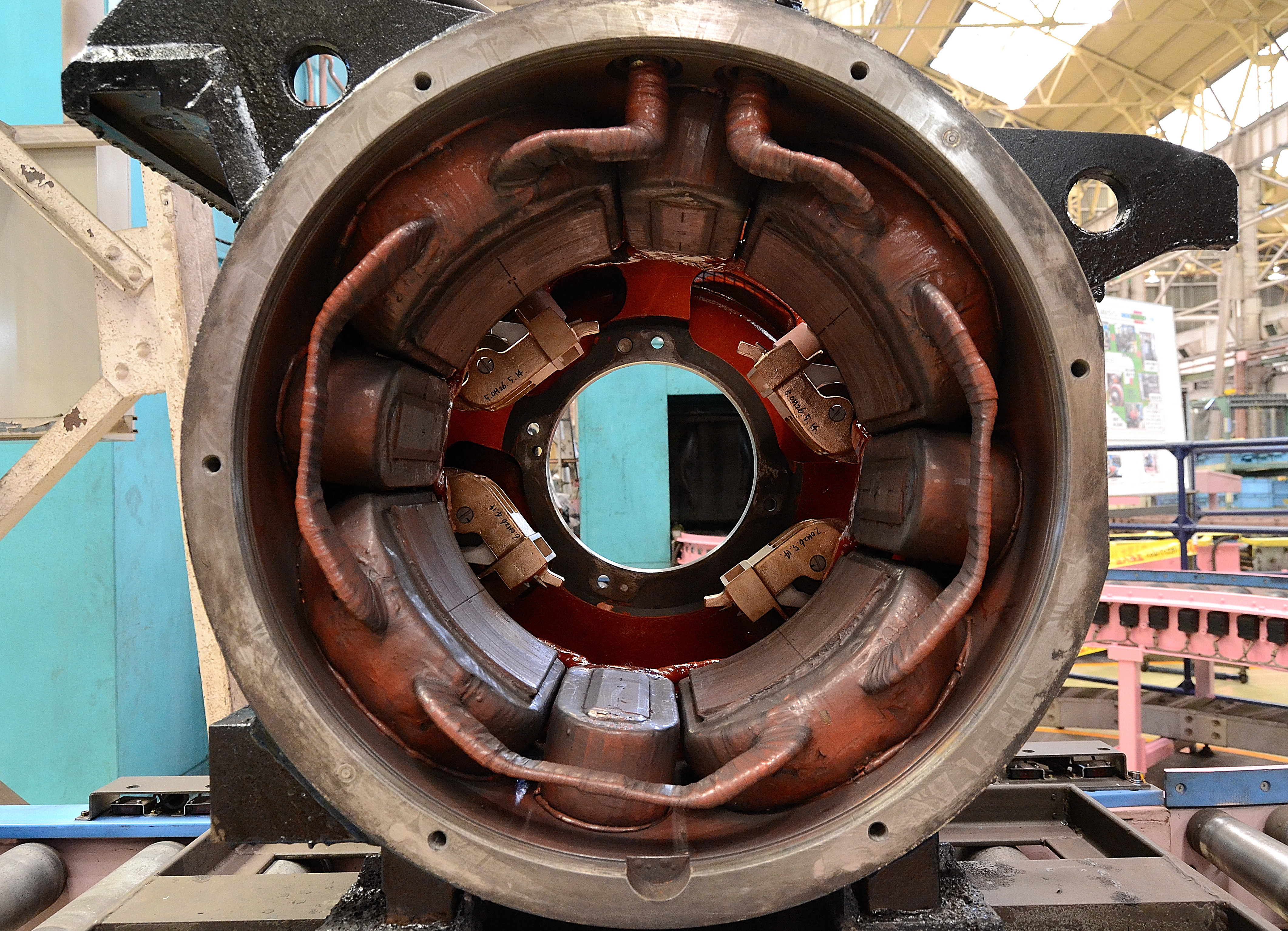 MT61形直巻整流子電動機の内部に取付けられた固定子（手前）とブラシホルダ（奥）。（2014年のJRおおみやふれあい鉄道フェアーでの工場開放にて撮影）